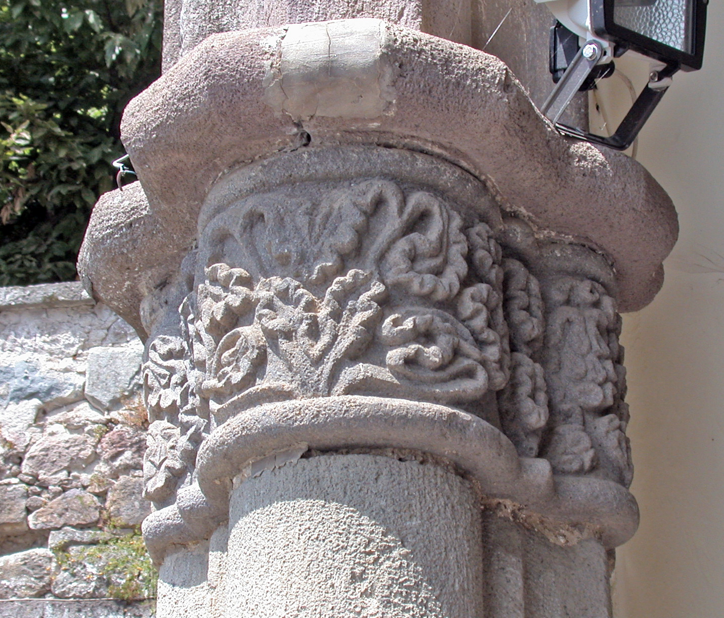 Italia, regione Campania, provincia di Caserta, Roccamonfina, santuario di Maria Santissima di Lattani, capitello dell'ingresso della chiesa